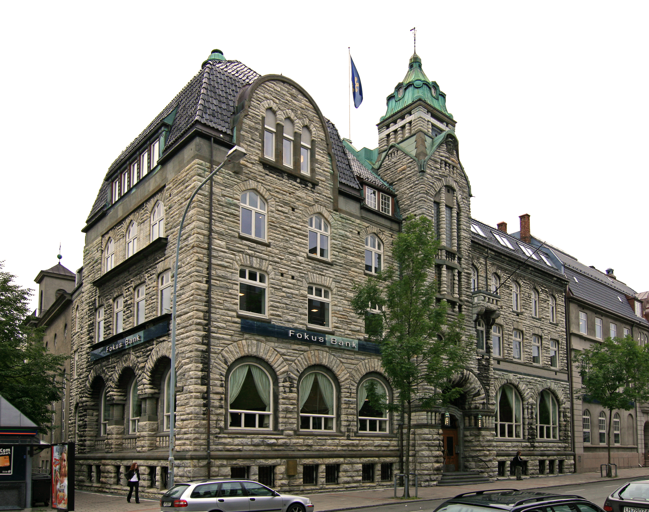 Søndre gate 15 (Forretningsbanken), Trondheim. Bygd 1915; arkitekt Johan Osness